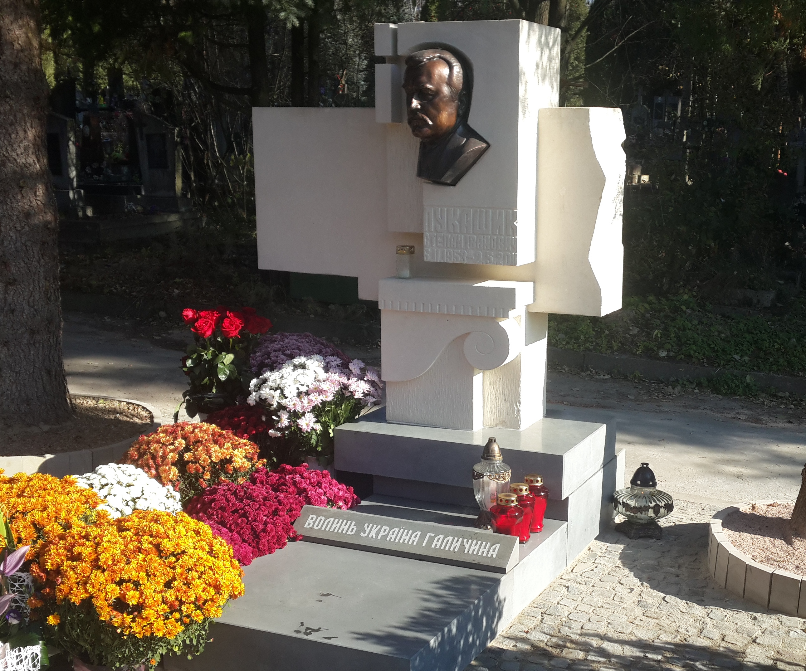 Пам'ятник Степану Лукашику на Голосківському цвинтарі